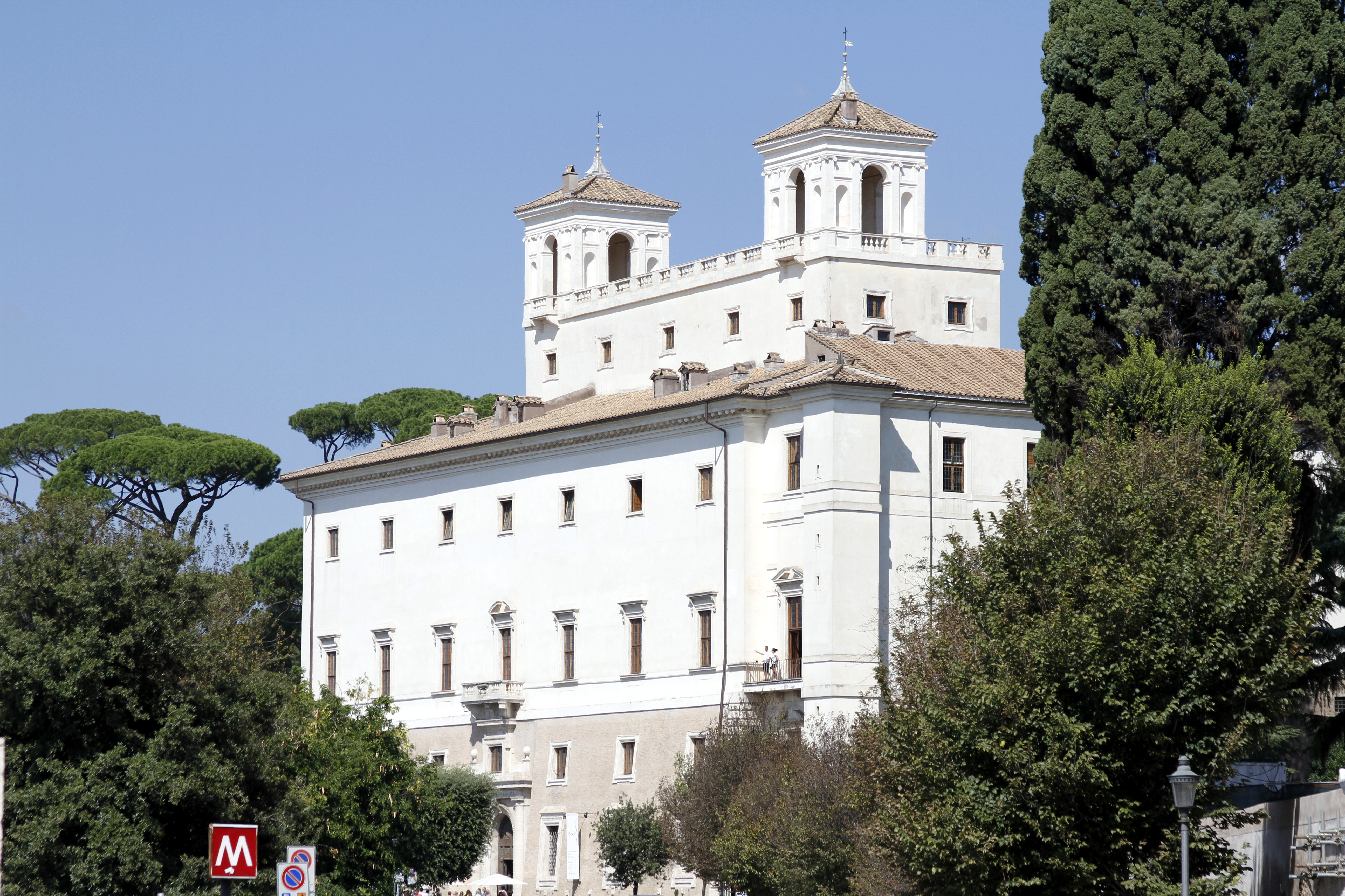 Villa Medici - Rome